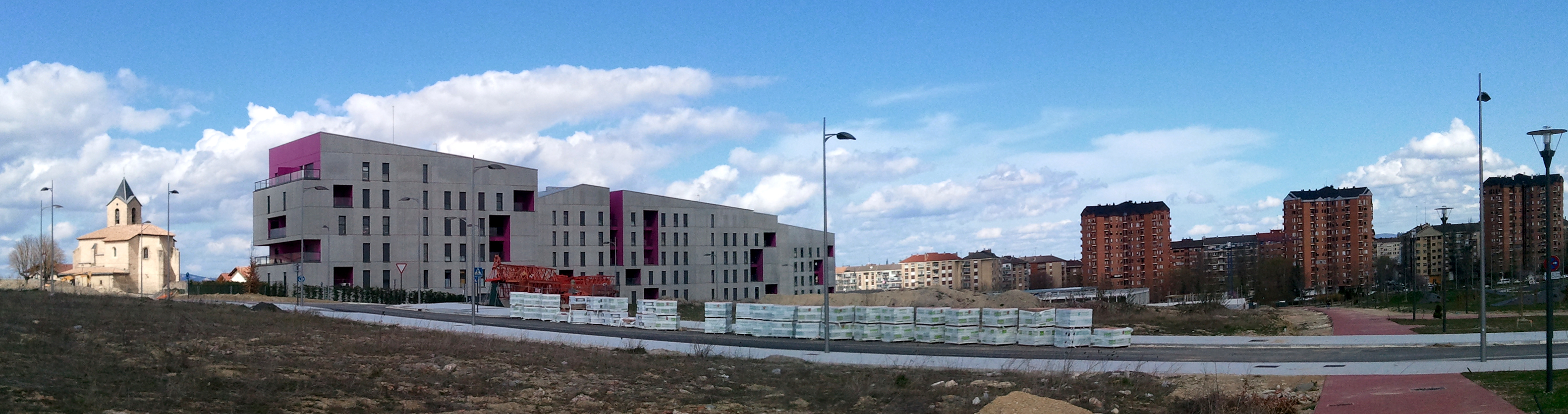 Aretxabaleta (Gasteiz) herriko auzo berria (2013. urtean)